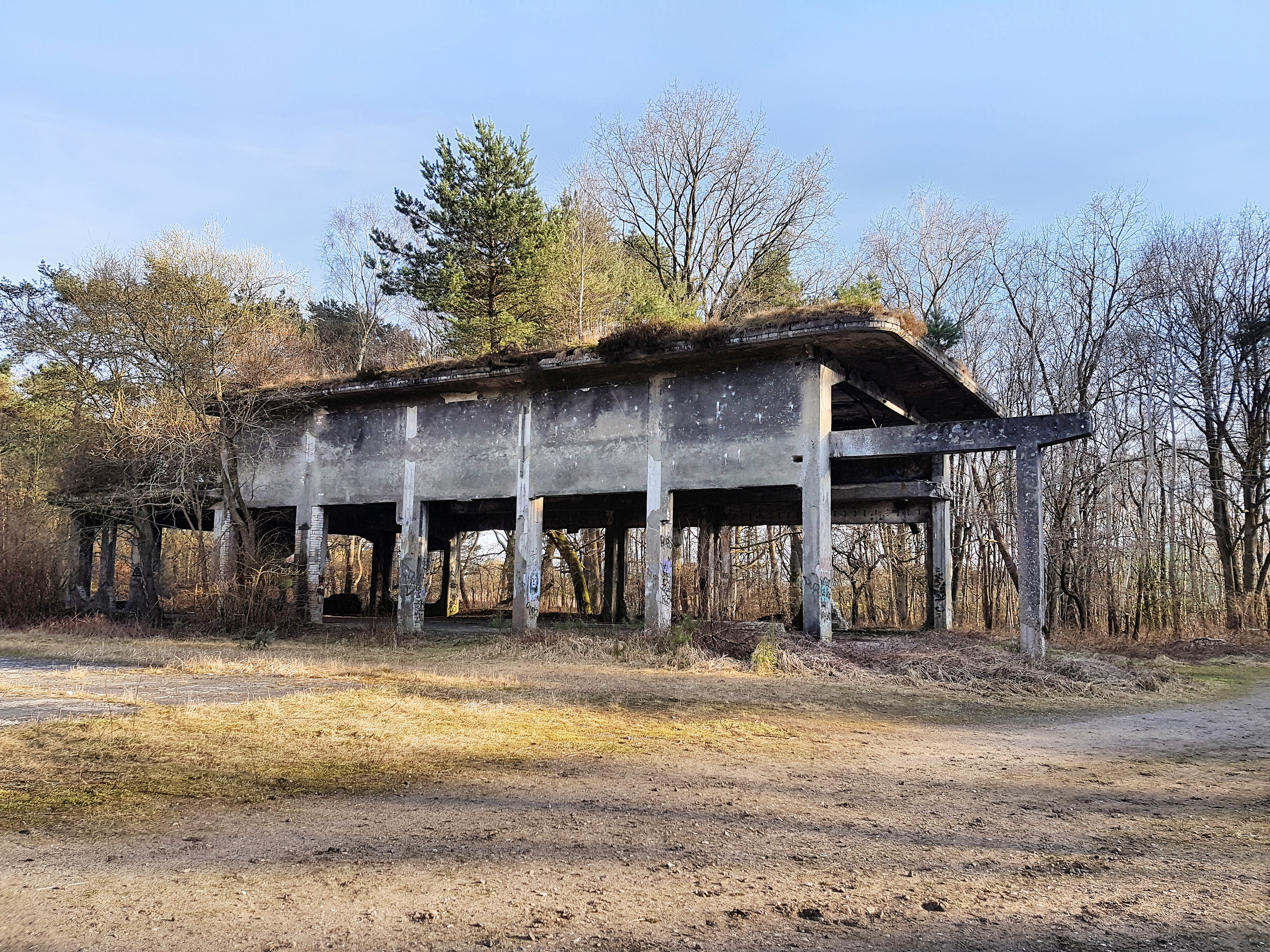 Werkstatt der Pulverfabrik Düneberg im Naturschutzgebiet „Besenhorster Sandberge und Elbsandwiesen“